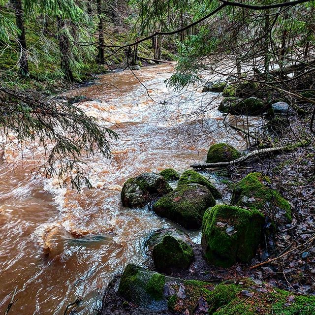 Ohkolanjoki tulvii Ohkolanjokilaaksossa.